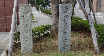 長崎市新町尋常小学校と興善尋常小学校を表す碑